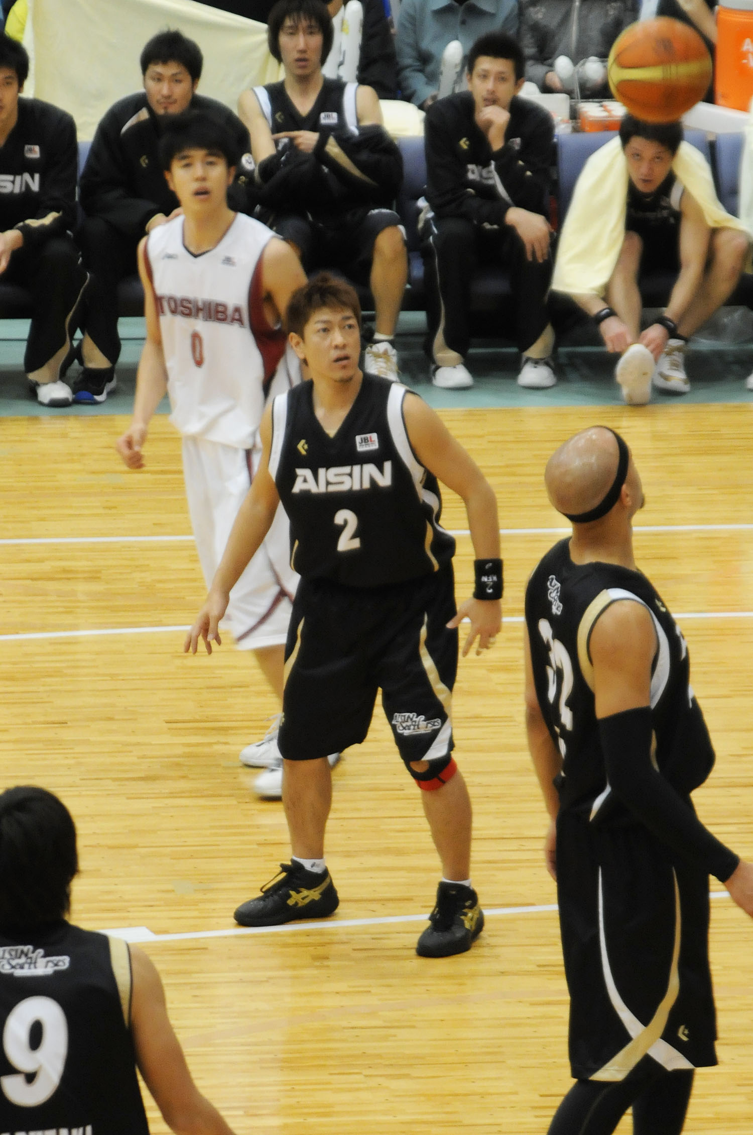 アイシンシーホースの佐古賢一選手。琴丘総合体育館で。